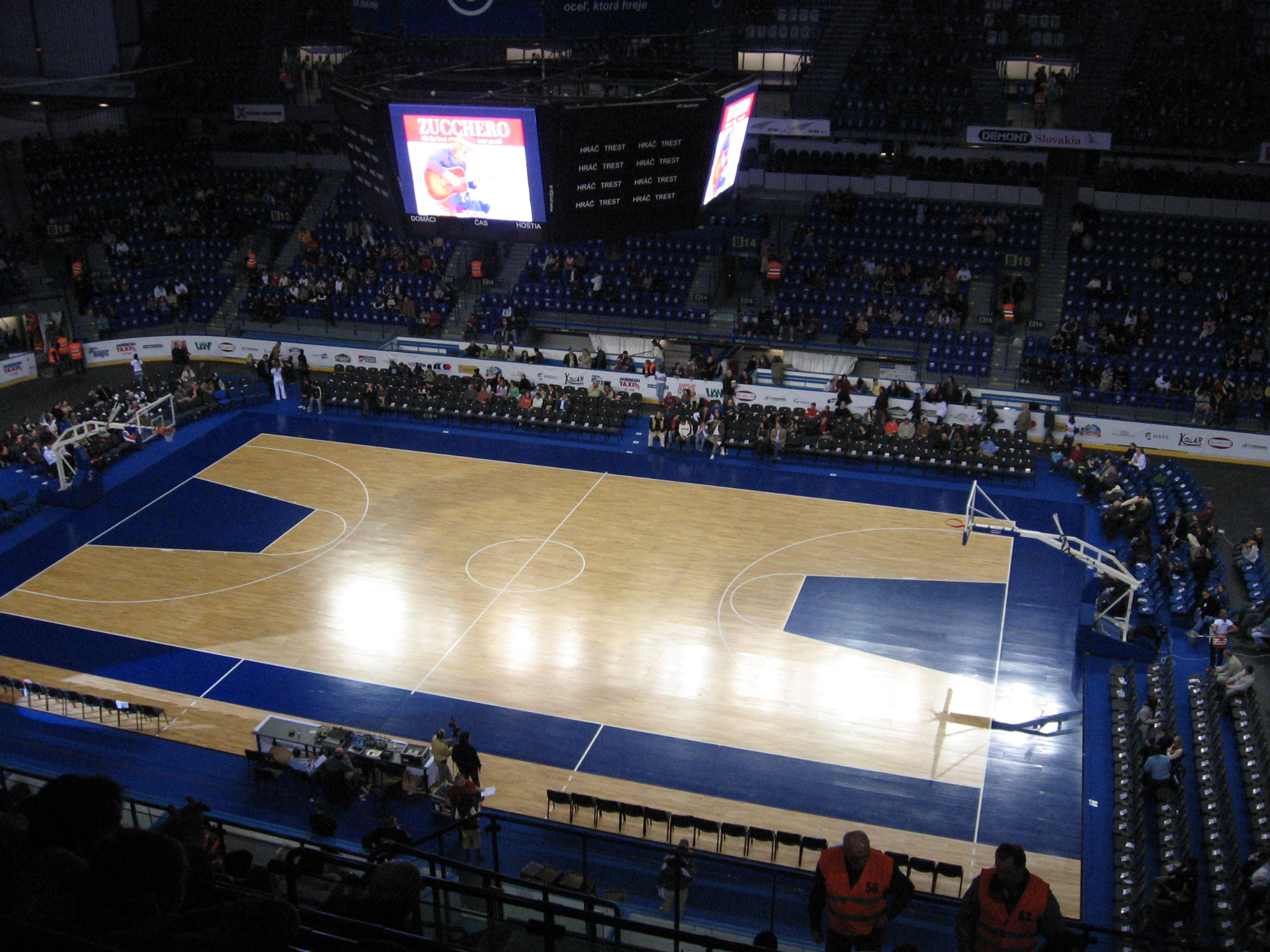 Steel Aréna Košice, 26. február 2008, príprava na vystúpenie basketbalového tímu Harlem Globetrotters